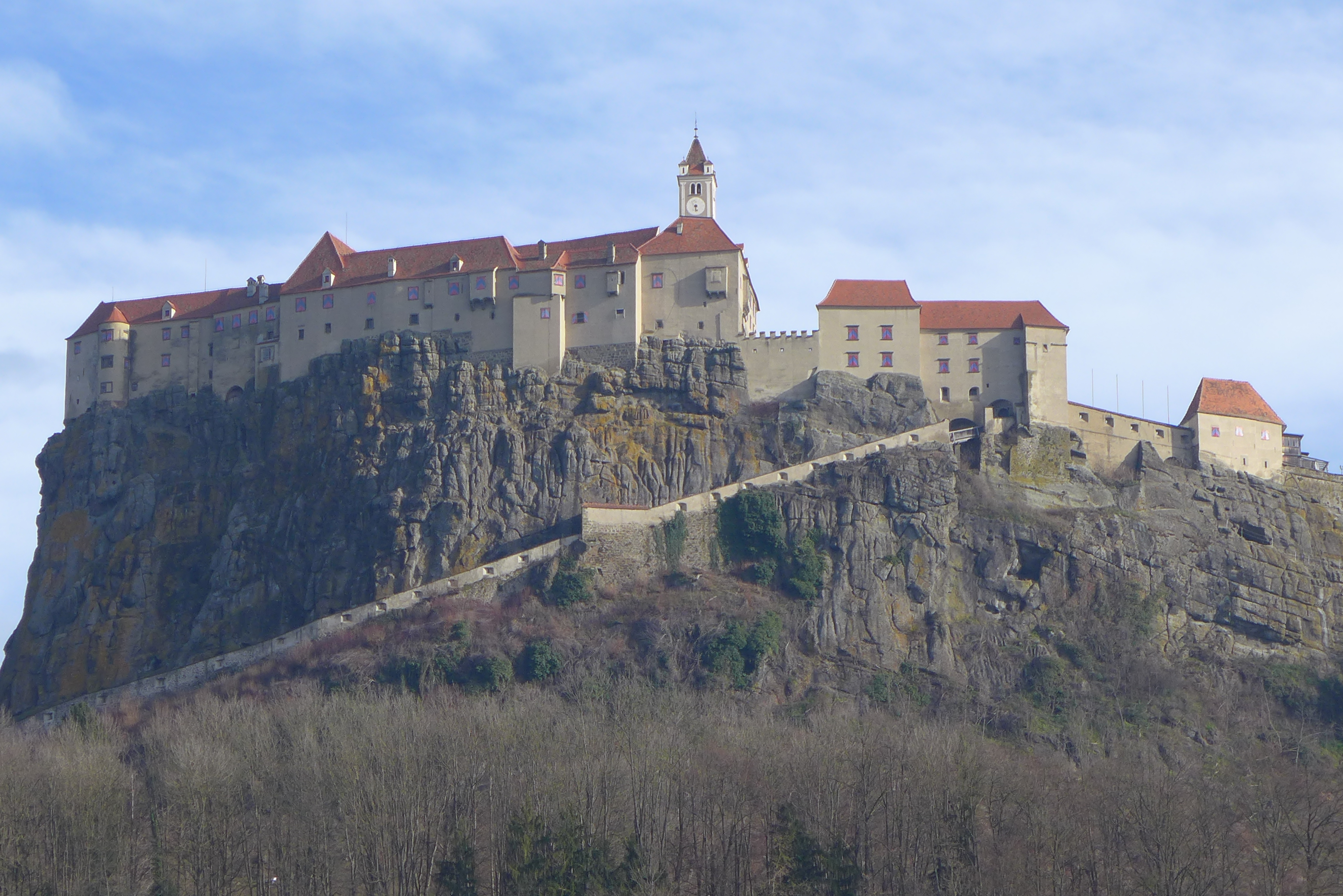 Die Riegersburg von Süden 2